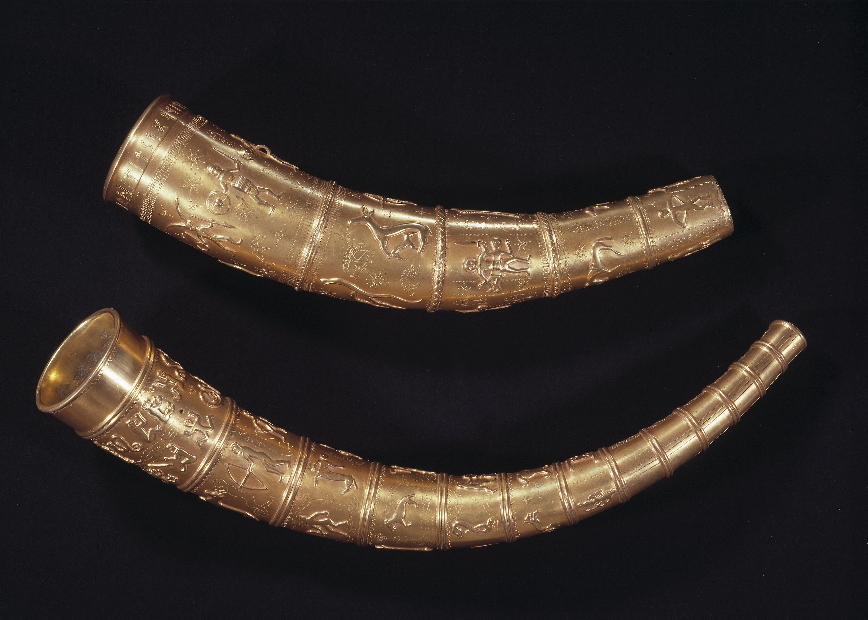 De to guldhornskopier.